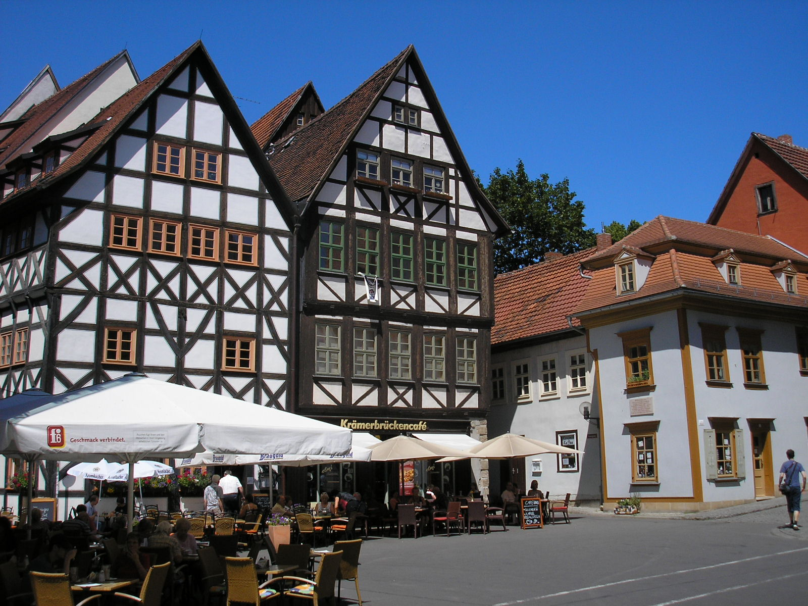 Blick über den Benediktsplatz in Erfurt.